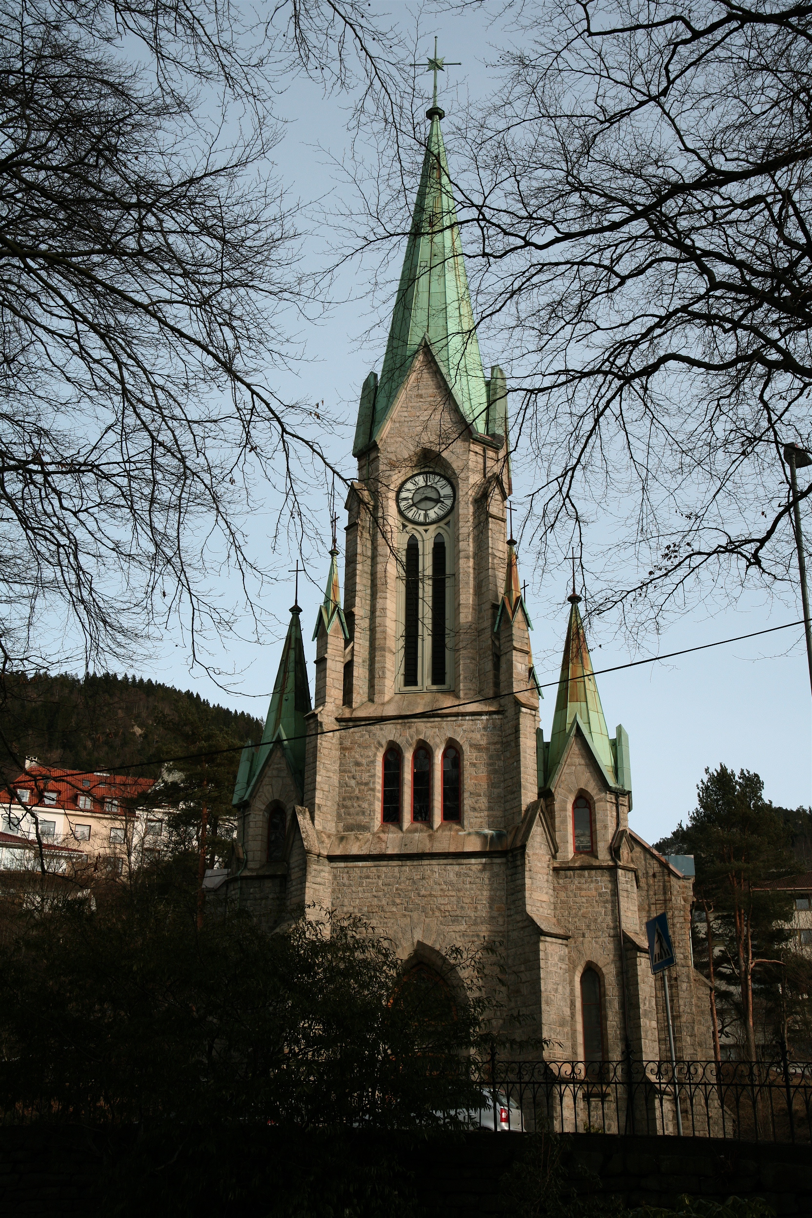 Sandvikskirken i Bergen